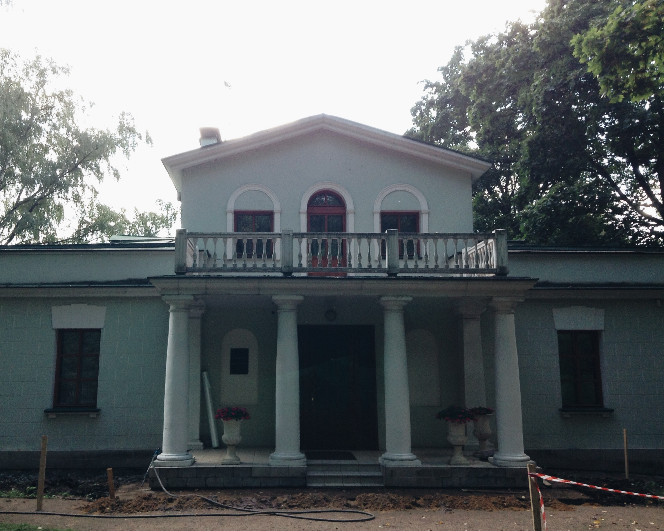 Музей-усадьба «Остафьево» - «Русский Парнас» (музейный комплекс) (Москва и Московская область, Щербинка, село Остафьево)